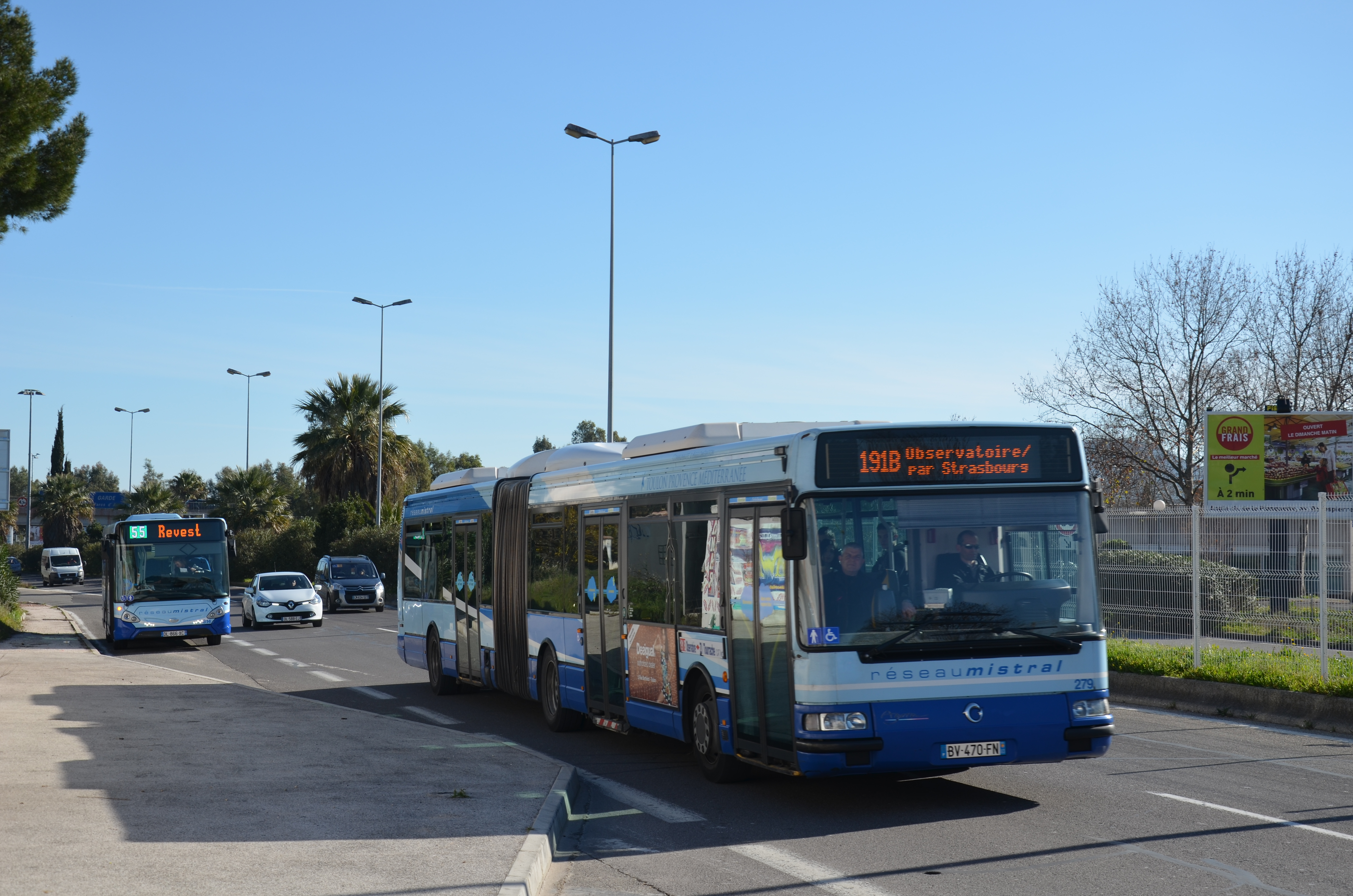 Heuliez GX 137 n°314 et Irisbus Agora L n°279 sur les lignes 55 et 191B du réseau Mistral, à l'arrêt Campus La Garde / La Valette.